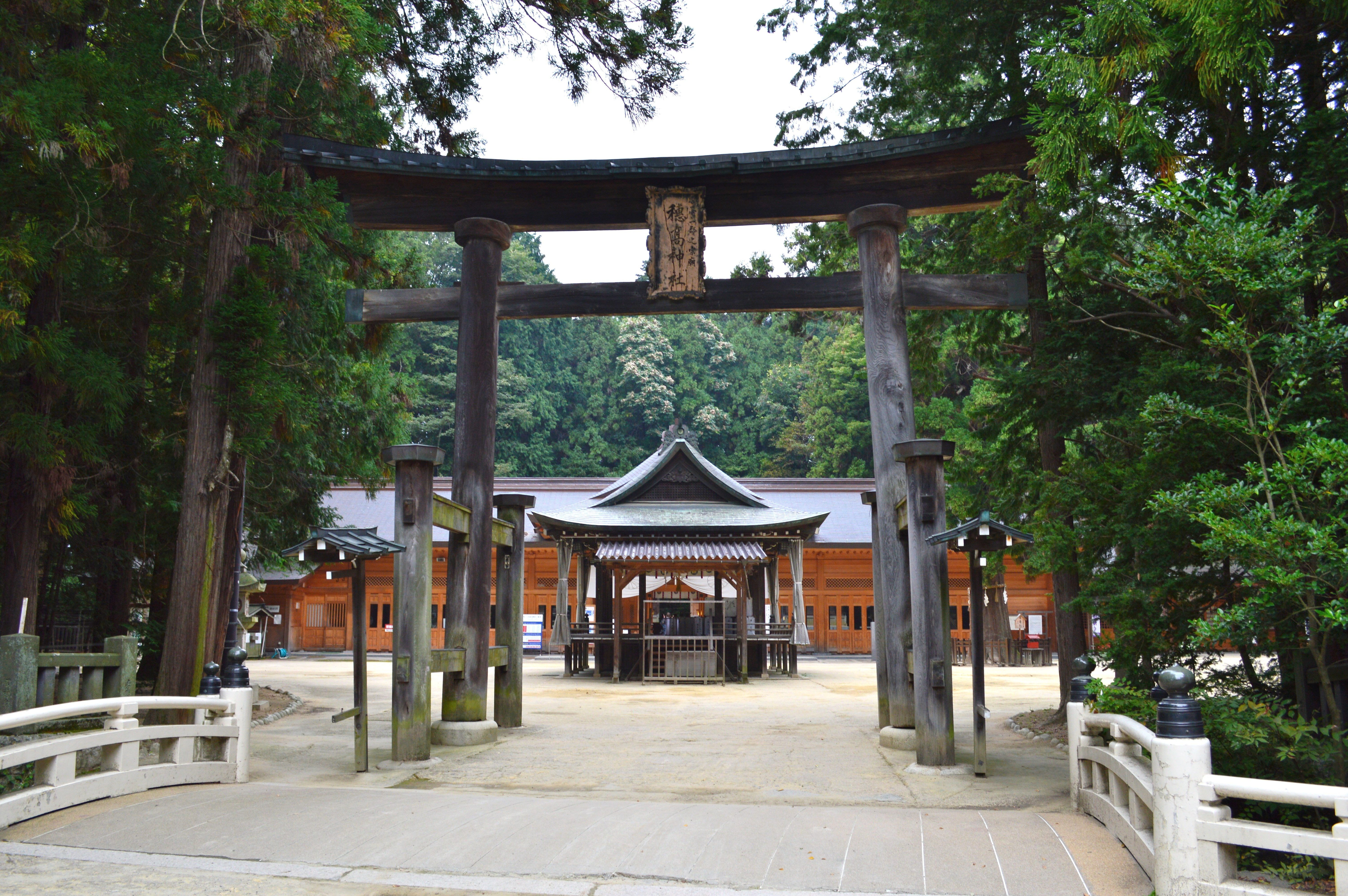 穂高神社 鳥居